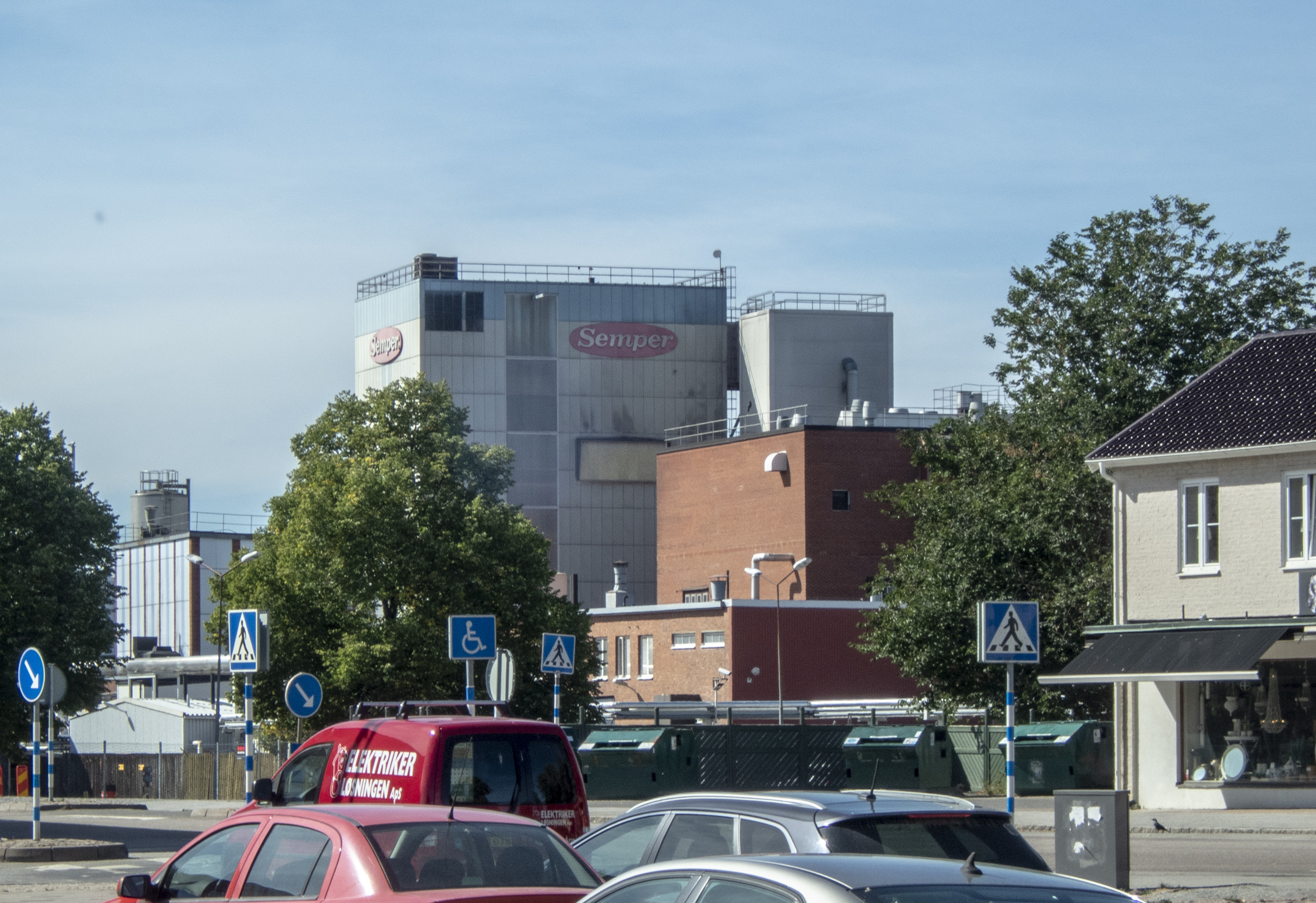 Götene mejeri